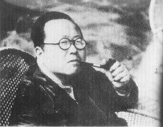 来源：